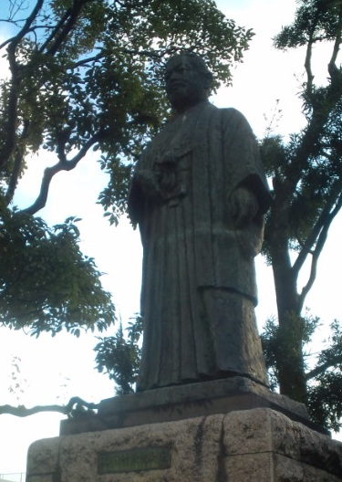 西岡竹次郎 （公選2・3代 長崎県知事）像